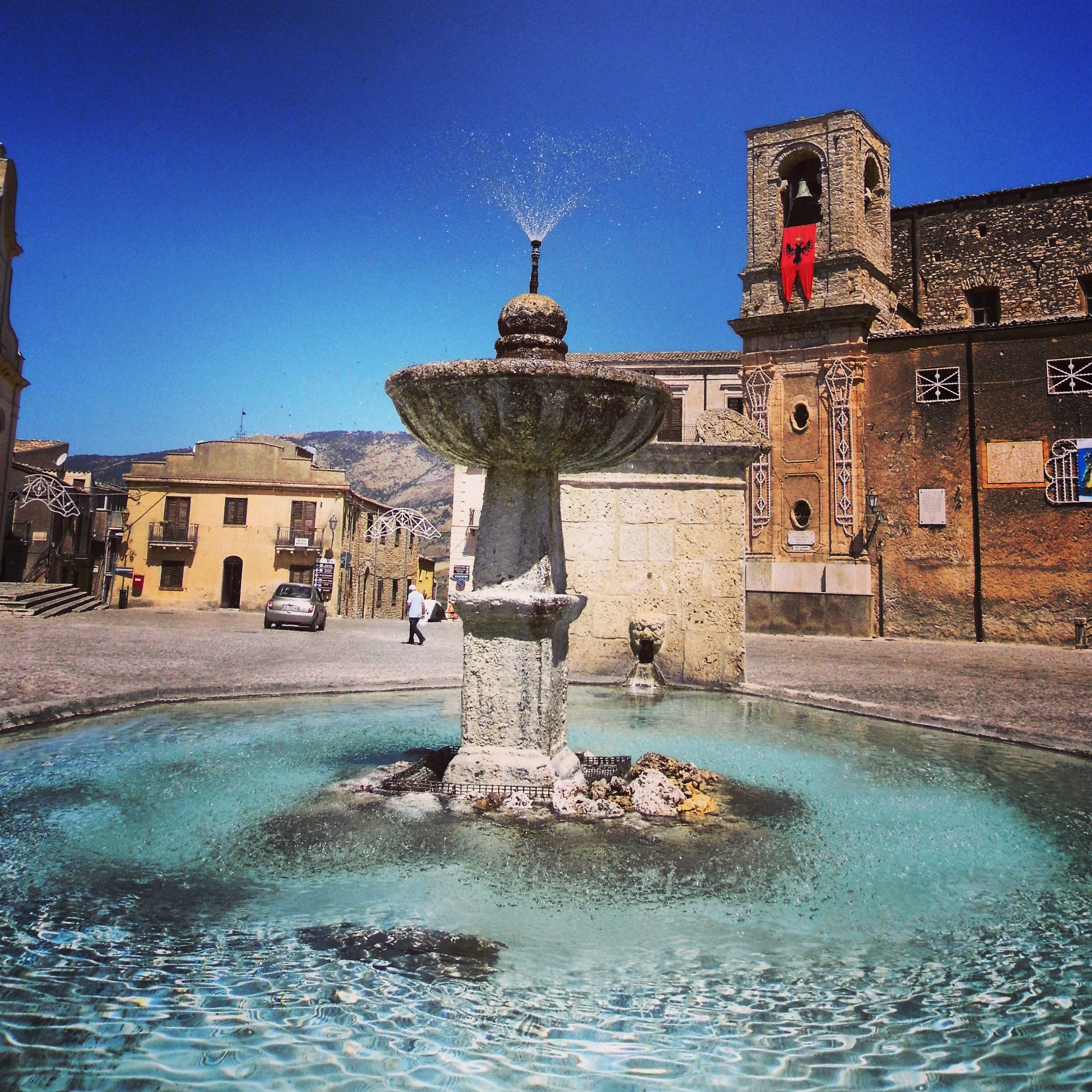 Fontana ottagonale di Piazza Umberto I This is a photo of a monument which is part of cultural heritage of Italy.